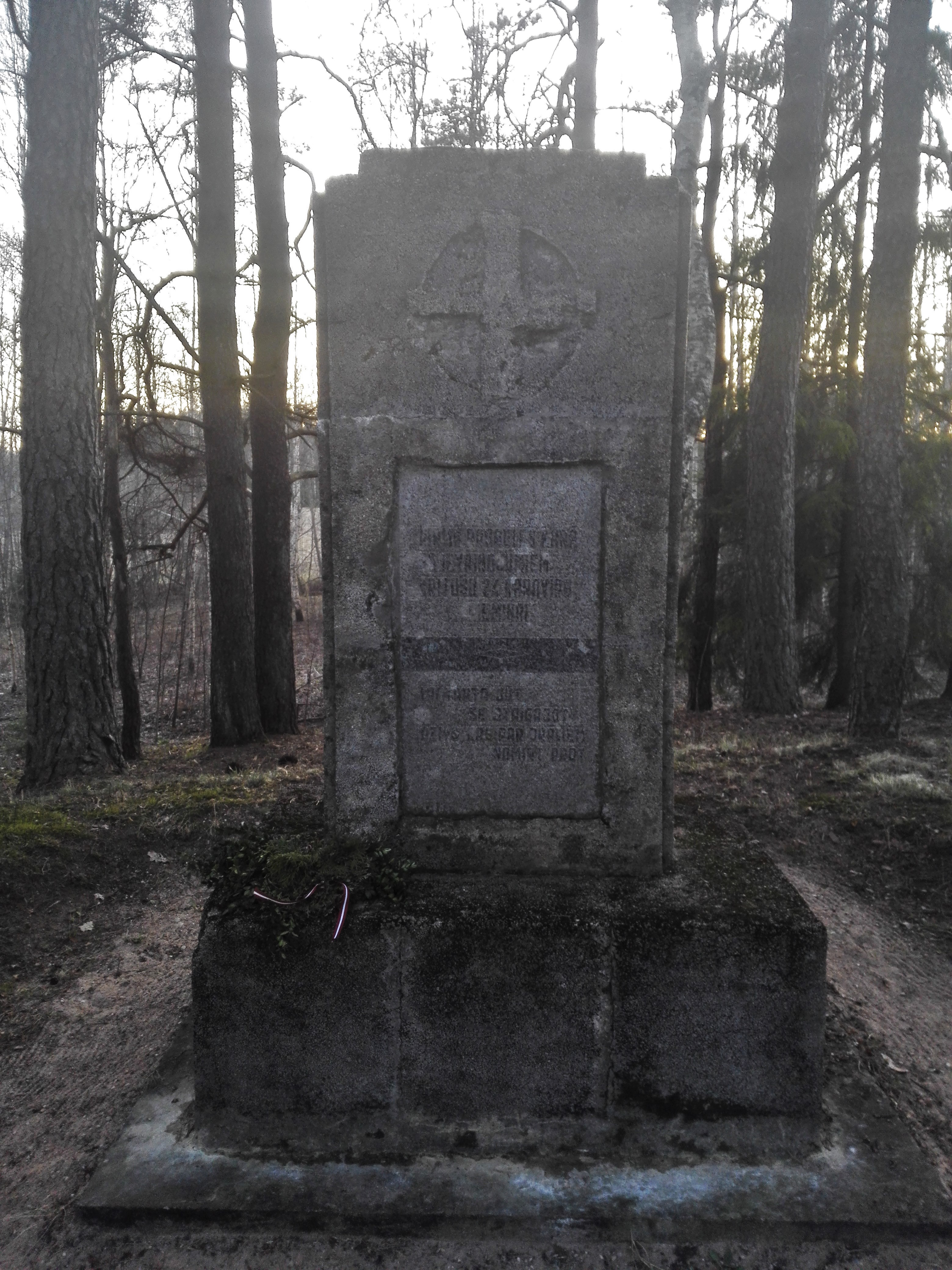 Brāļu kapu piemineklis Spārē